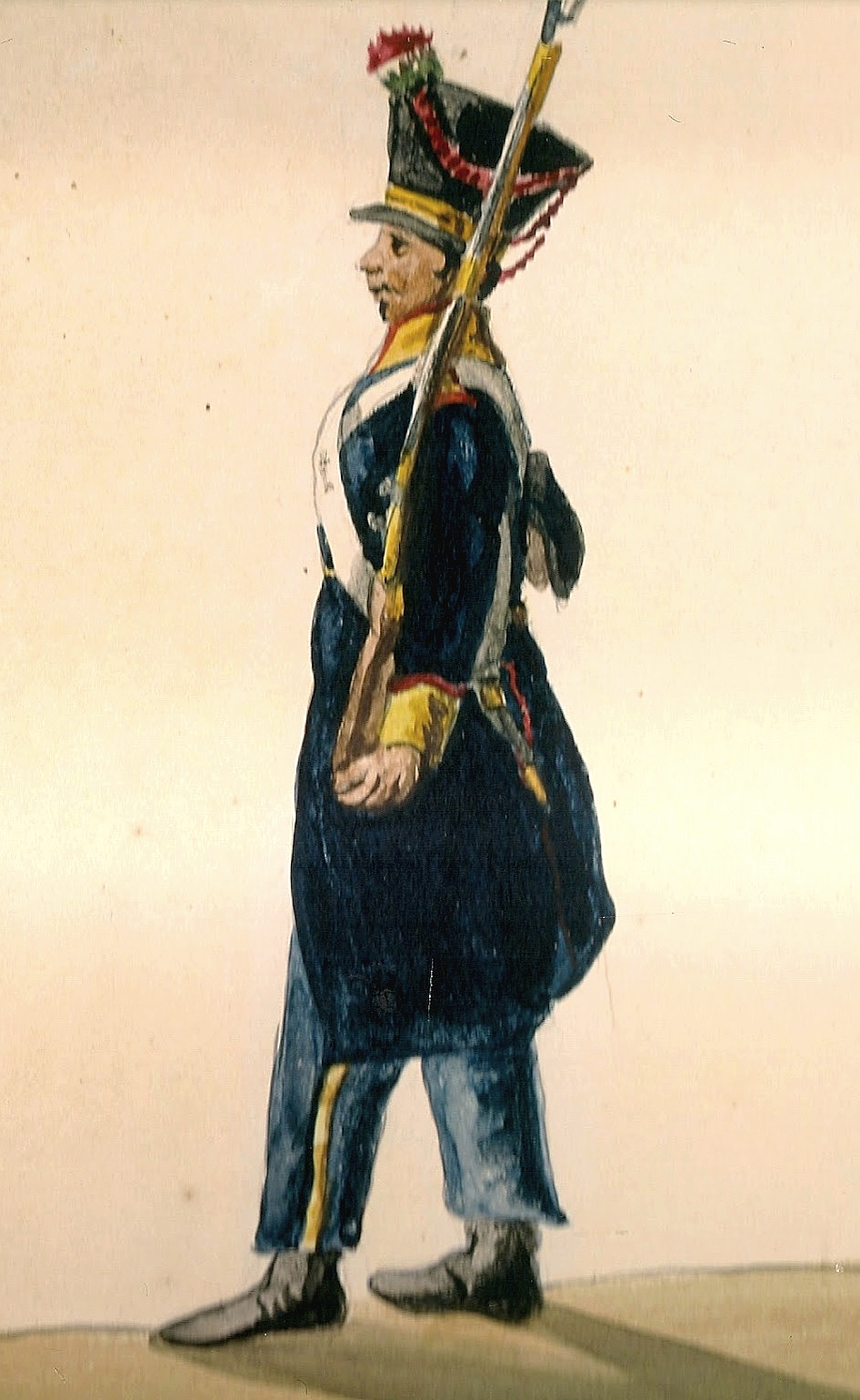 Independencia de México. Soldado de la división del general Guerrero.